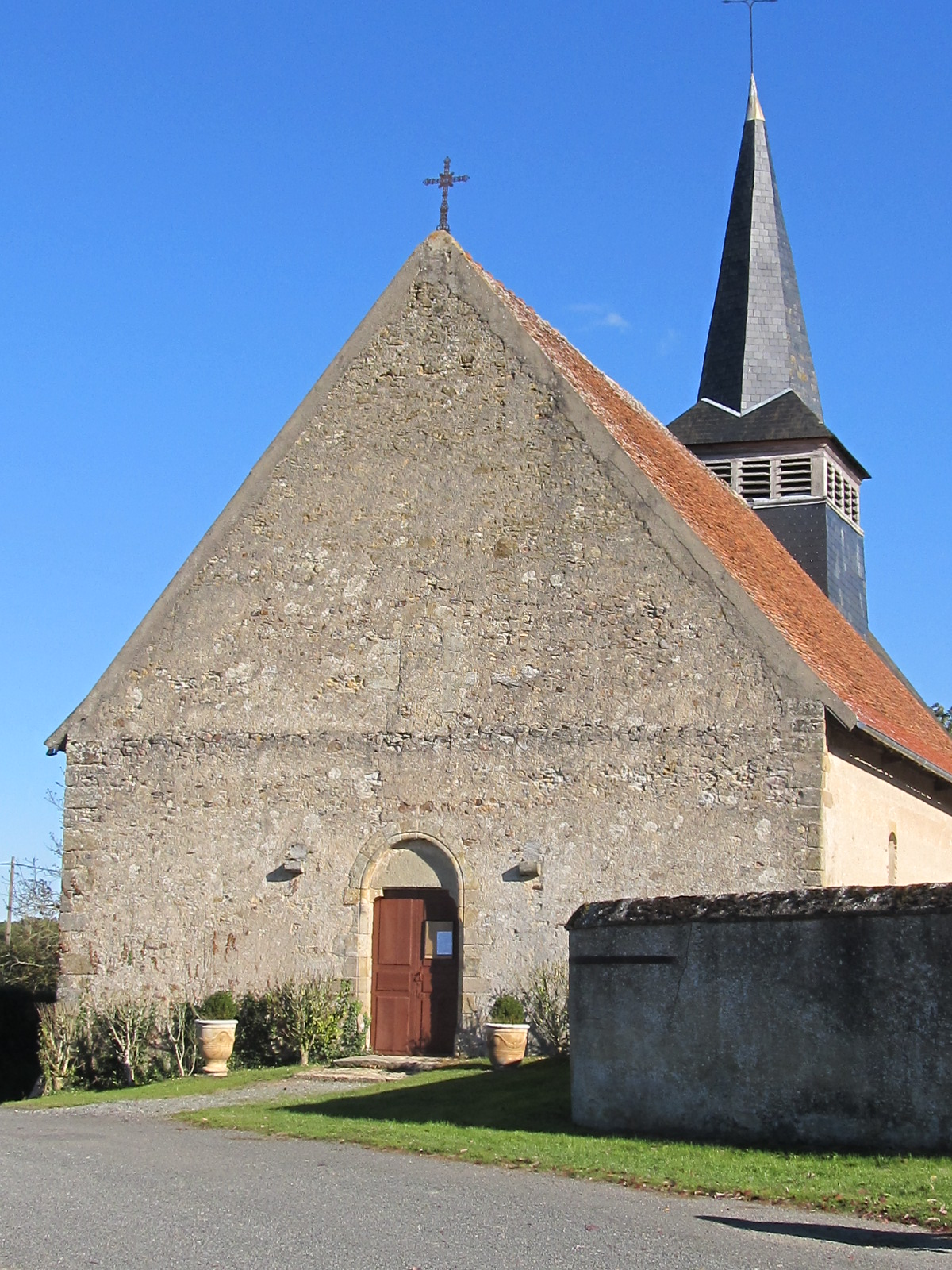 Vue de la commune de Thaix, avec sa Mairie, son église, ses paysages